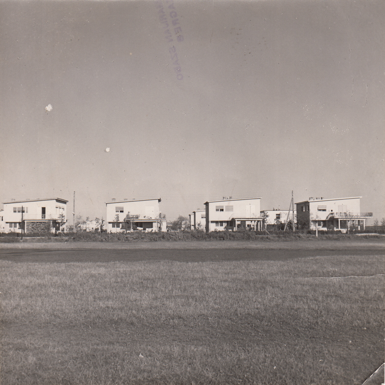 1. Cvijetno naselje u izgradnji